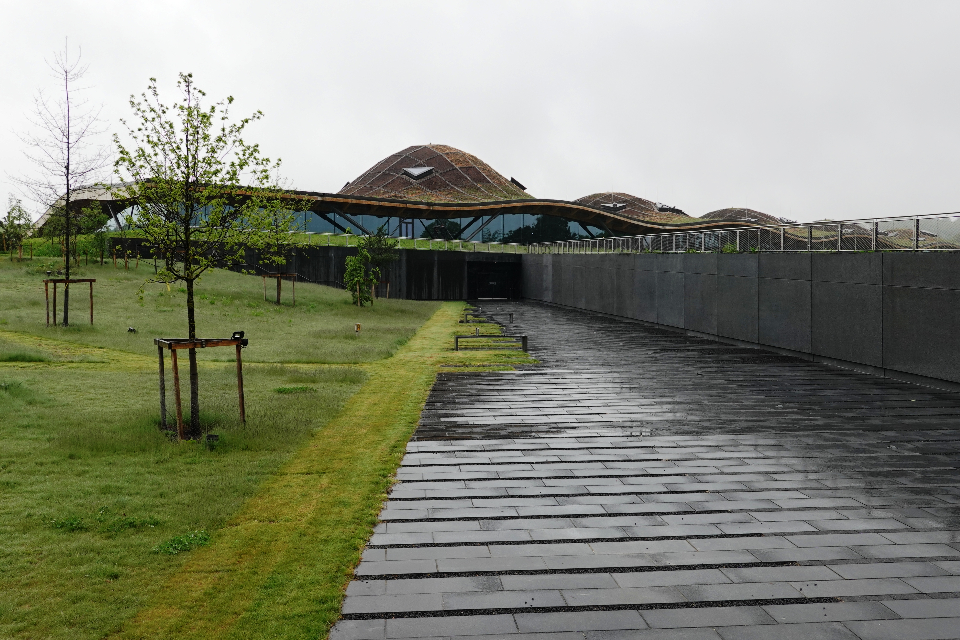 המזקקה החדשה ומרכז המבקרים